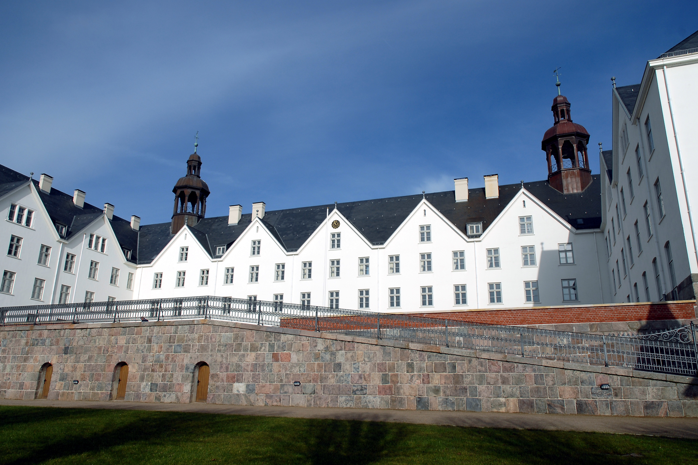 Plöner Schloss